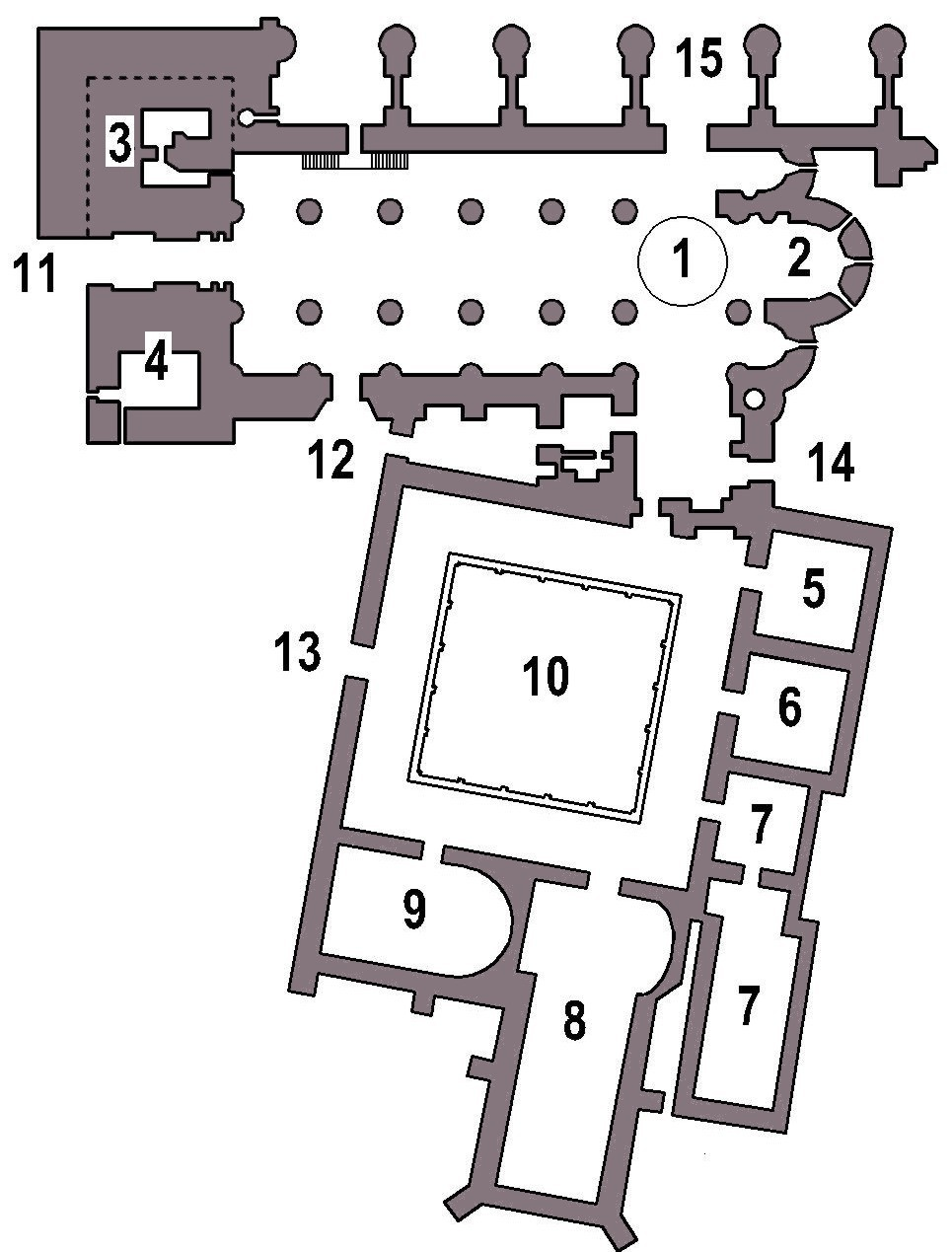 Planta de la Catedral Vieja de Salamanca